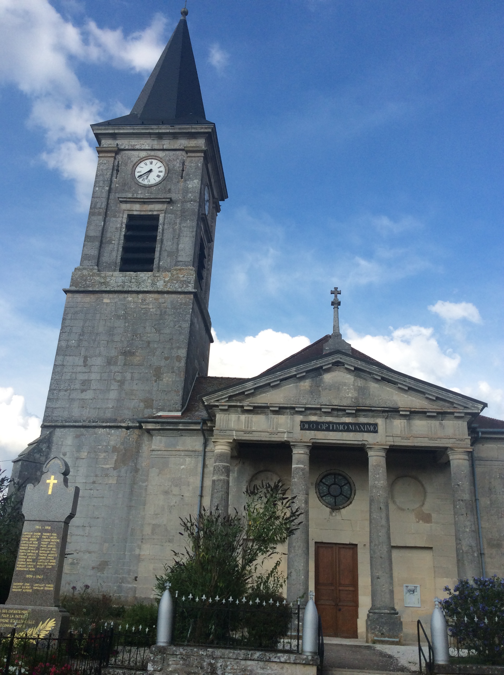 L'église d'Aillianville